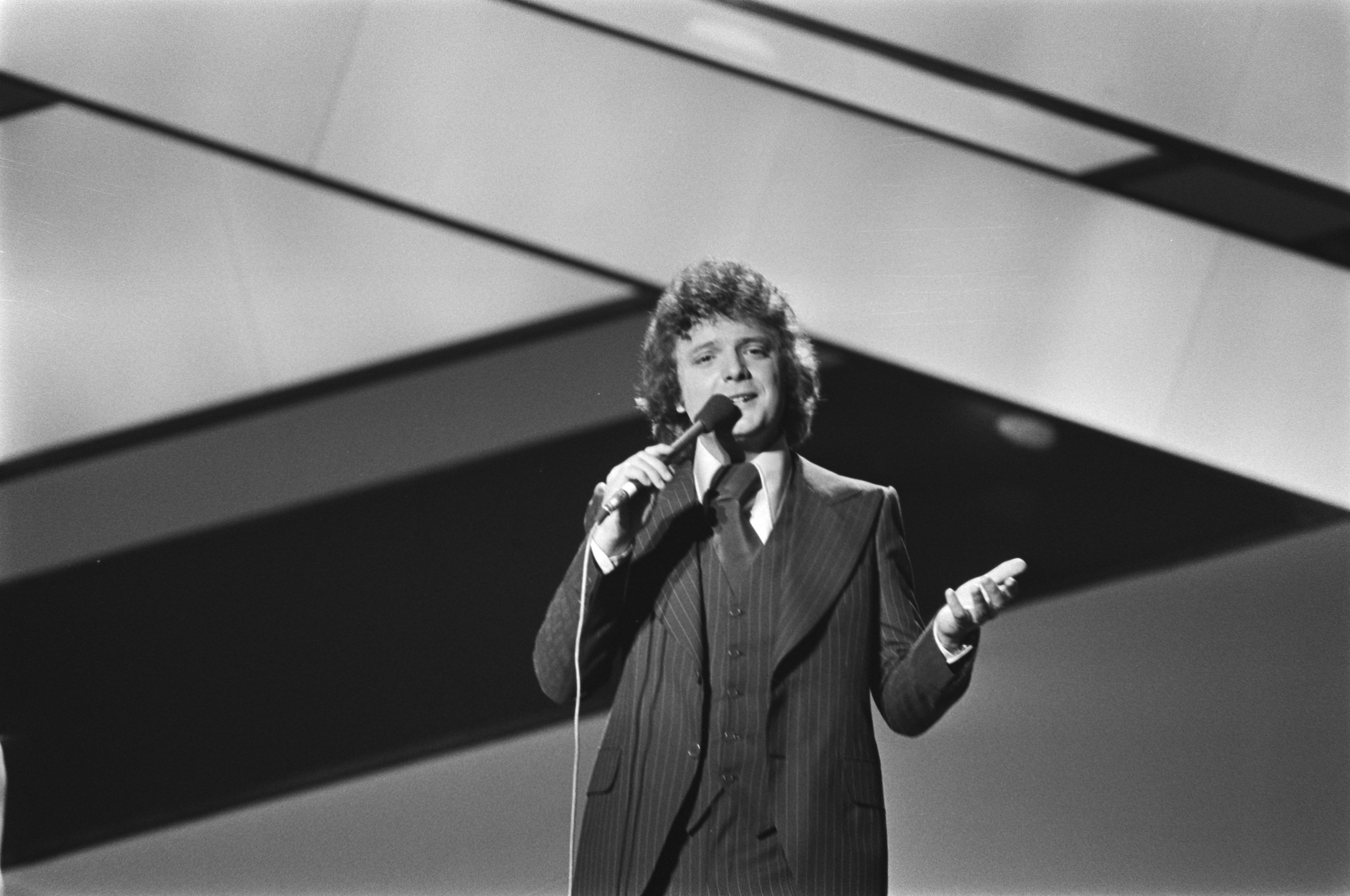 Collectie / Archief : Fotocollectie Anefo Reportage / Serie : [ onbekend ] Beschrijving : Eurovisie Songfestival 76 Den Haag ; Braulio (Spanje) Datum : 3 april 1976 Locatie : Den Haag, Spanje Trefwoorden : songfestivals Persoonsnaam : Eurovisie Songfestival Fotograaf : Mieremet, Rob / Anefo Auteursrechthebbende : Nationaal Archief Materiaalsoort : Negatief (zwart/wit) Nummer archiefinventaris : bekijk toegang 2.24.01.05 Bestanddeelnummer : 928-5020